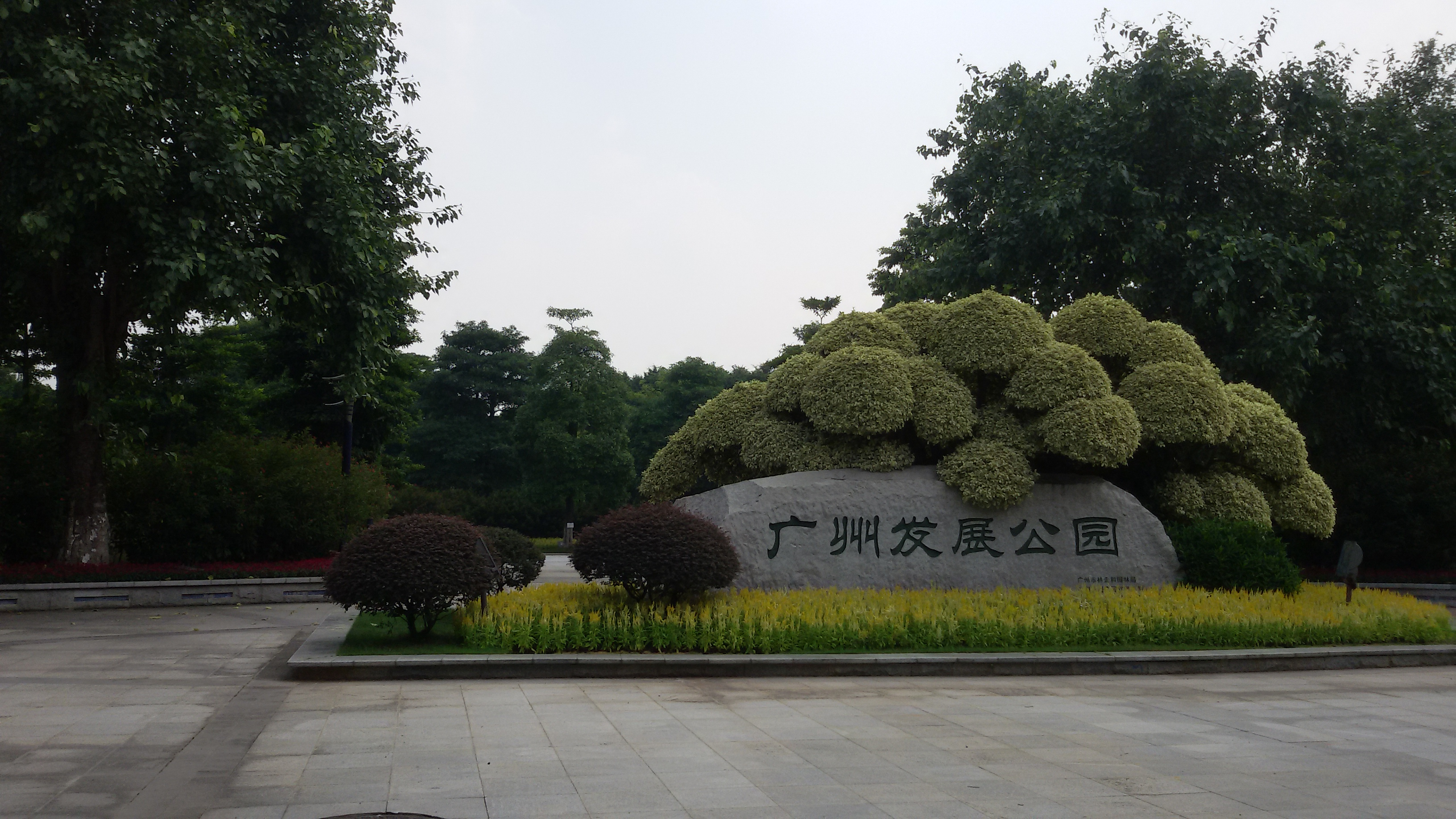 粵語: 廣州發展公園